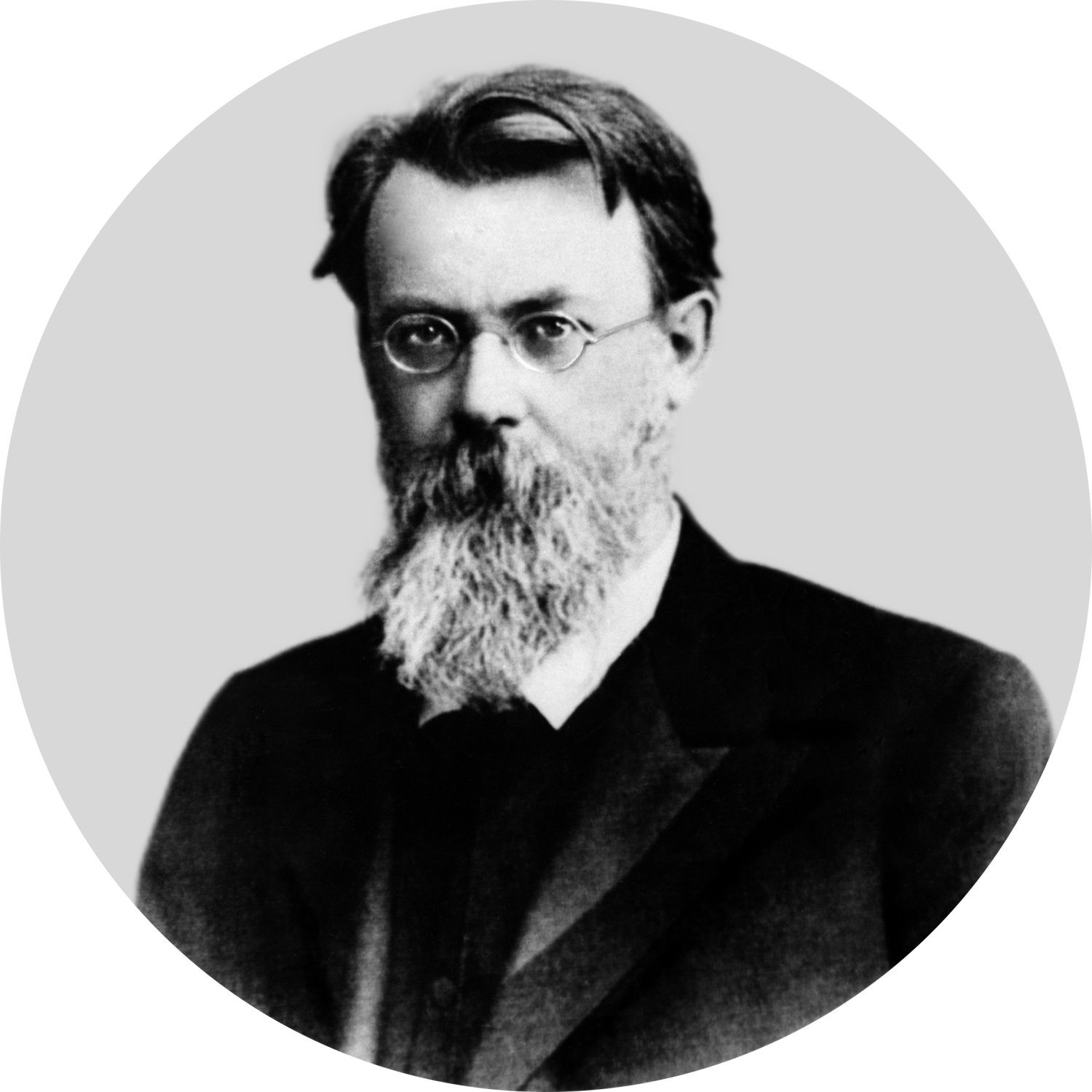 С этого фото в 1988 году к 125-летию со дня рождения В. И. Вернадского был сделан портрет В. И. Вернадского размером 4 на 5 метров, который украшал сцену Большого театра в Москве.